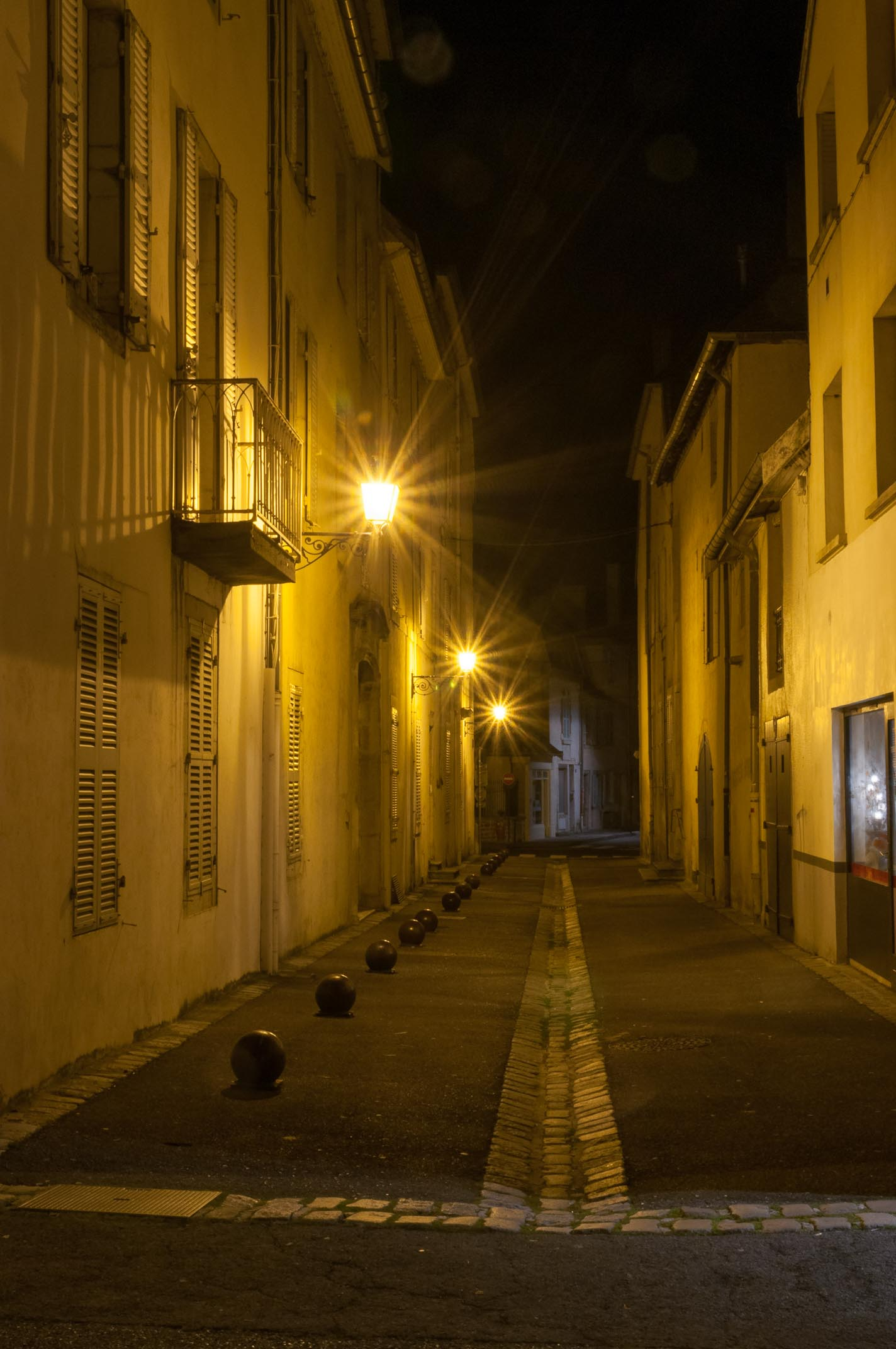 L'effet starburst se remarque sur les lampadaires avec l'effet étoilé de la diffraction de la lumière